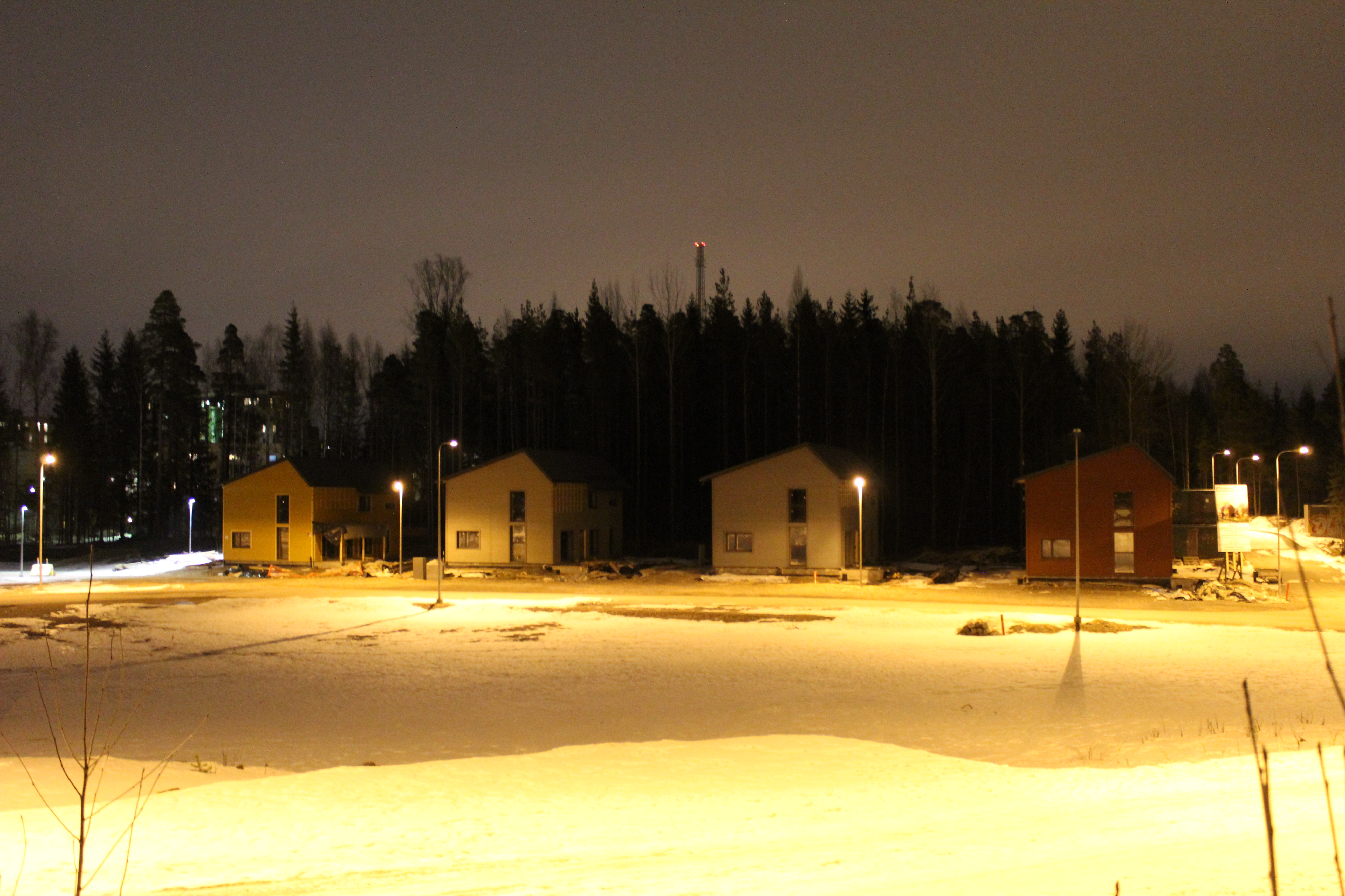 Honkasuon aloituskorttelin passiivitalot.